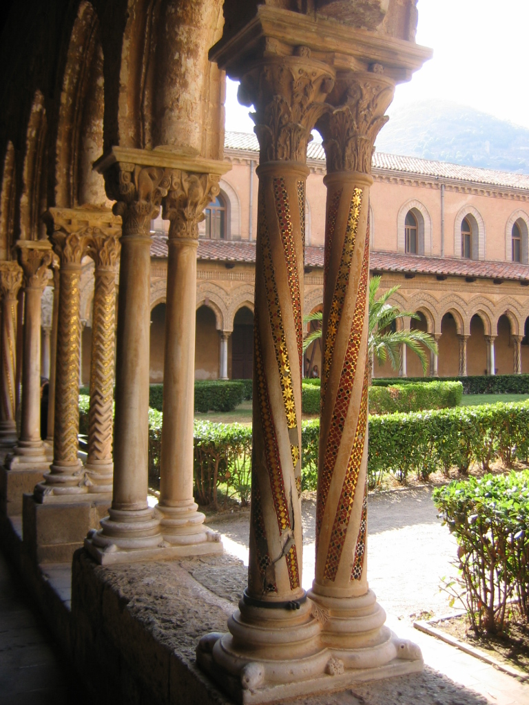 Monreale Cloister, Sicilia, Italia